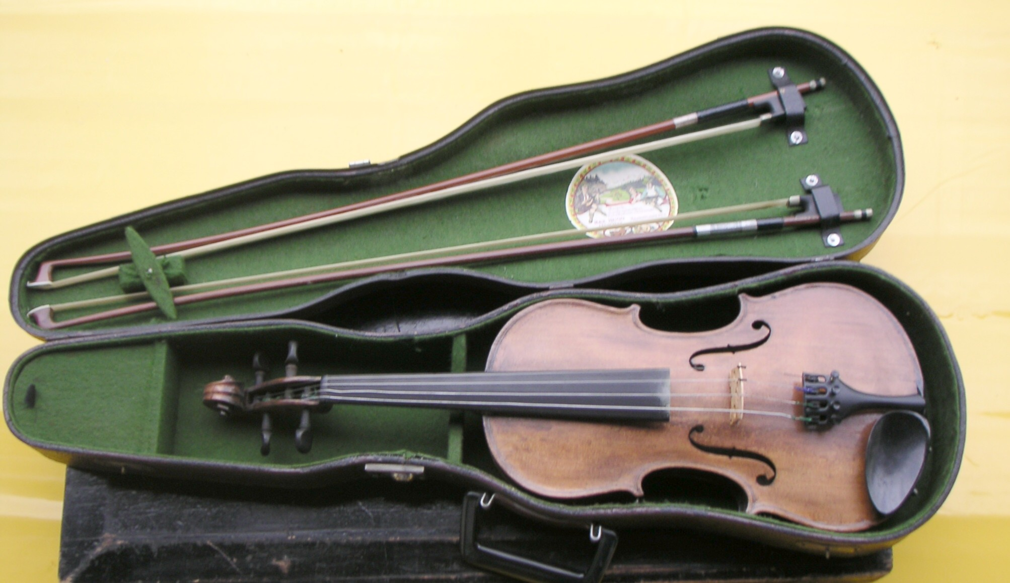 Von Christian Kremp hergestellte Geige